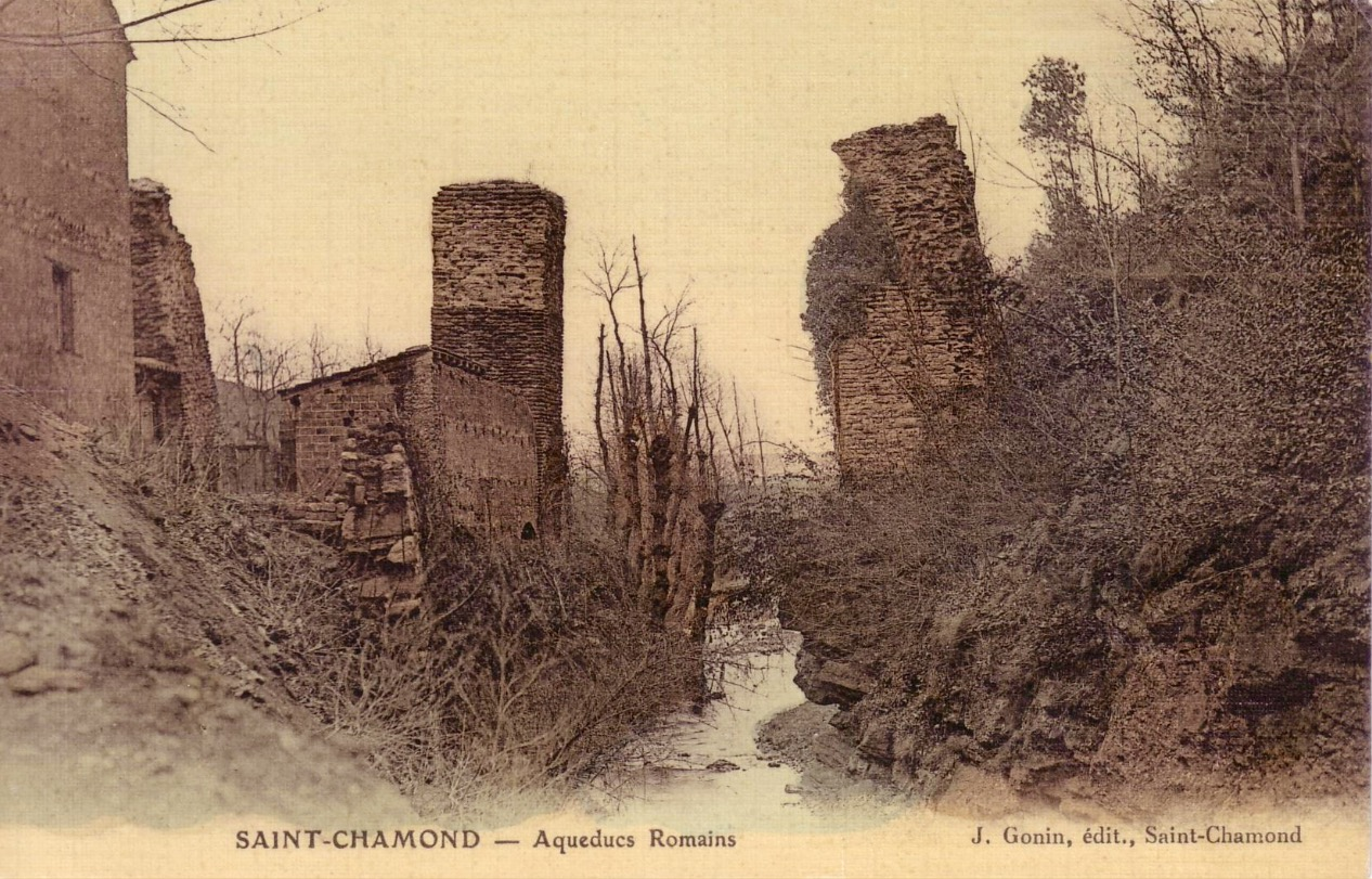 Saint-Chamond (Loire), vestiges de l'aqueduc romain, carte postale ancienne (non grevée de droits).